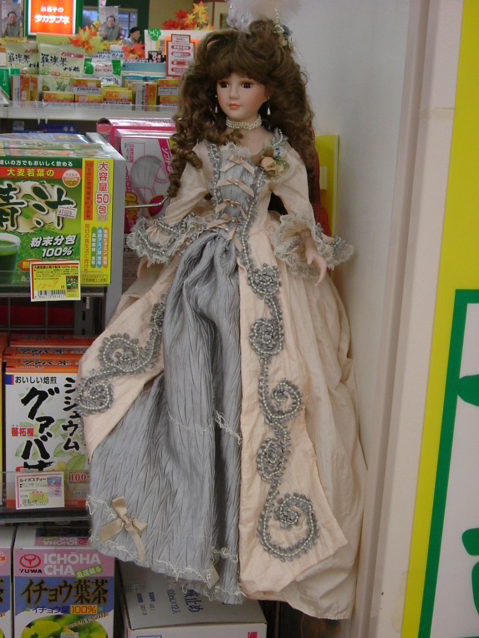 「フランス人形」の頁への画像挿入のため作成したもの。